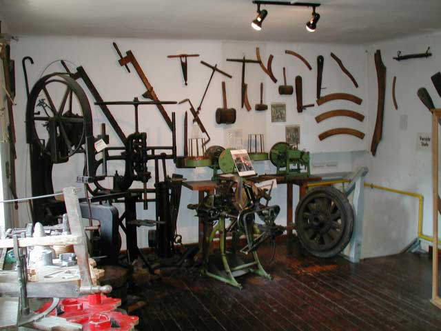 Im_Heimat-&Handwerkermuseum_der_Burg_Stolberg_(Rhld.)